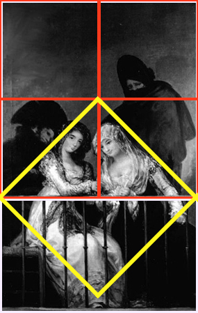 Las Majas en el balcón, de Francisco de Goya (entre 1808 et 1814). Schema di composizione, da Daniel Pao.